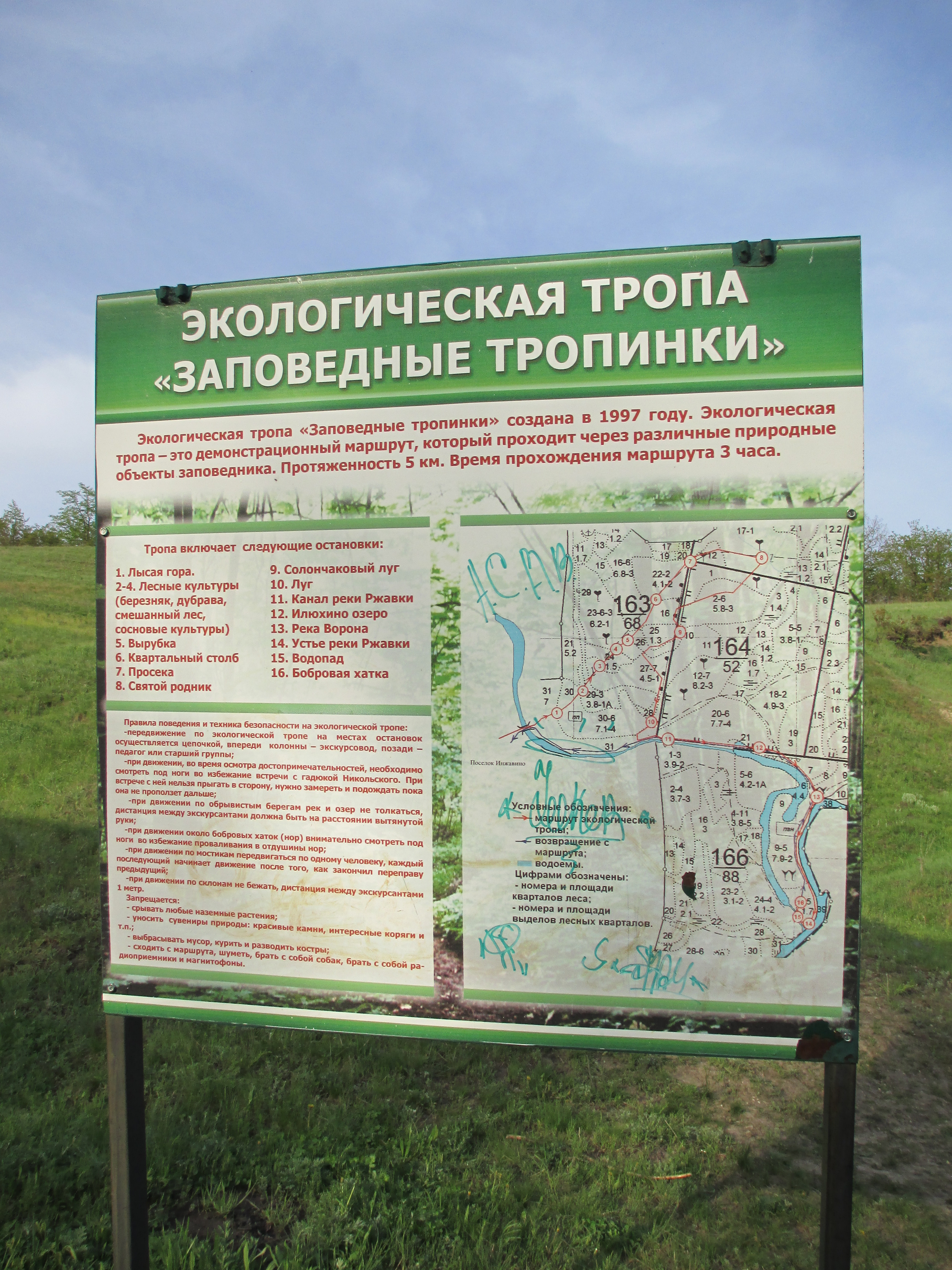 Информационный стенд маршрута "Заповедные тропинки"